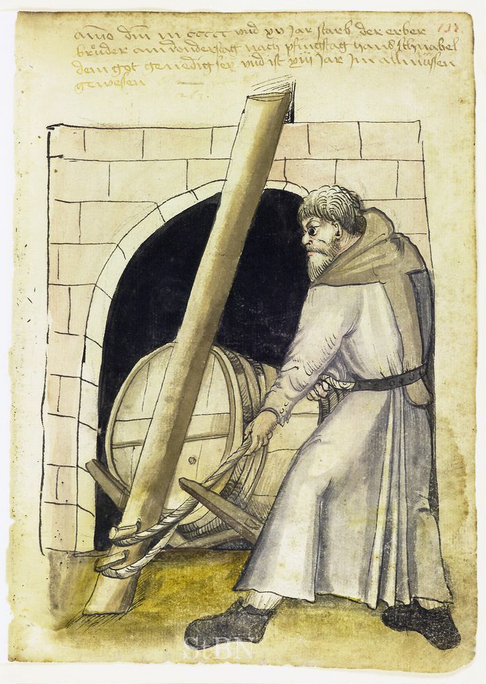 hans (Hans) schnabel (Schnabel) , --- (Weinschröter) Transkription und weitere Informationen